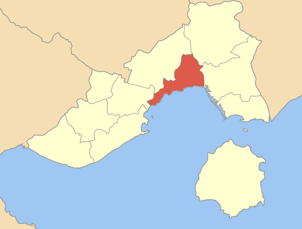 Locator map of Filippi municipality (Δήμος Καβάλας) in Kavala prefecture (Νομός Καβάλας) in Greece.